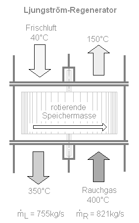 Schema Luftvorwärmer